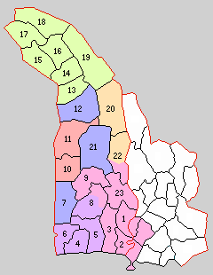 高座郡の町村。